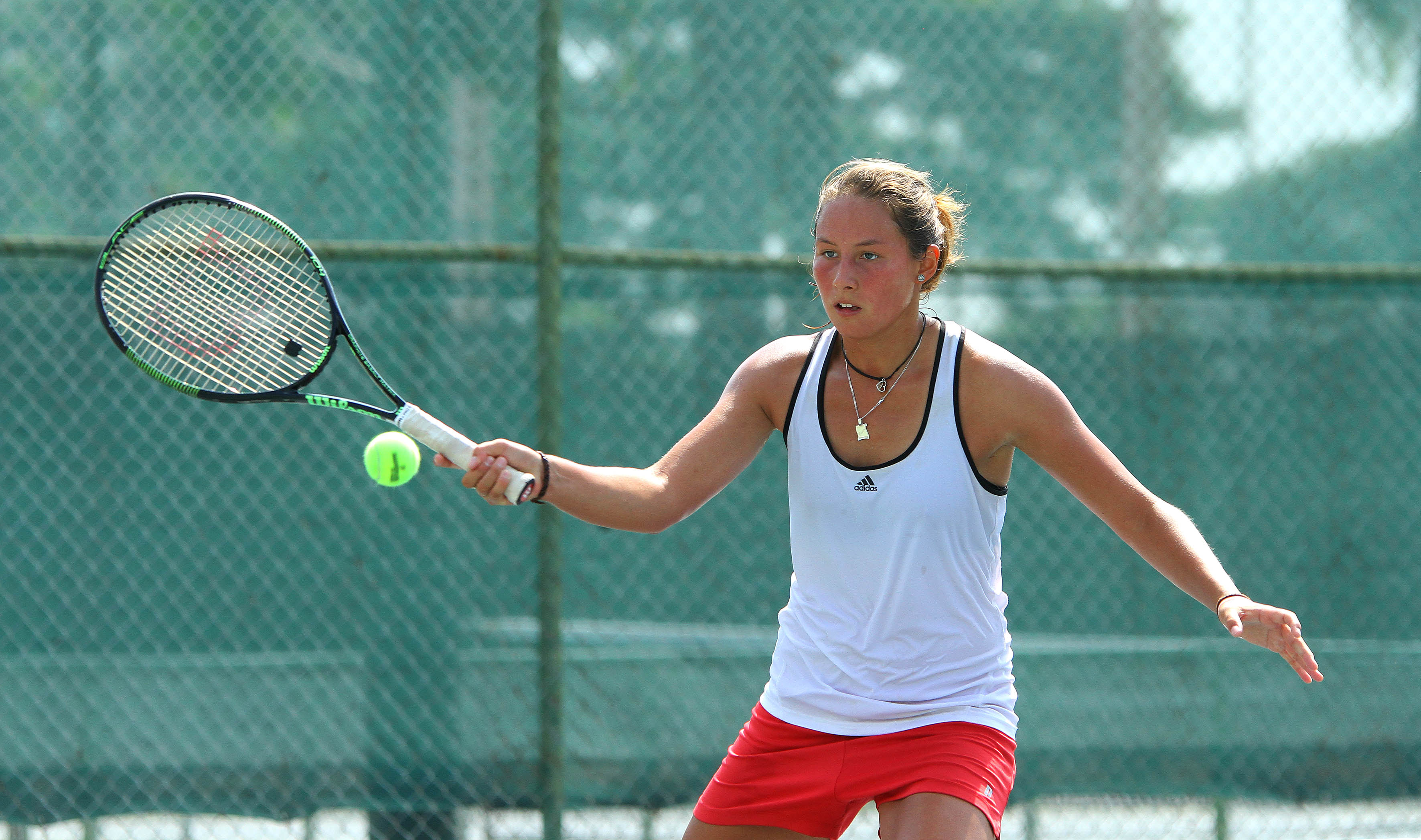 Guayaquil, 19 de jun del 2015 (Andes).-La tenista Charlotte Roemer, integra el equipo de Ecuador del Grupo II de la zona americana de la Fed Cup por BNP Paribas a disputarse en República Dominicana. Foto: César Muñoz/Andes